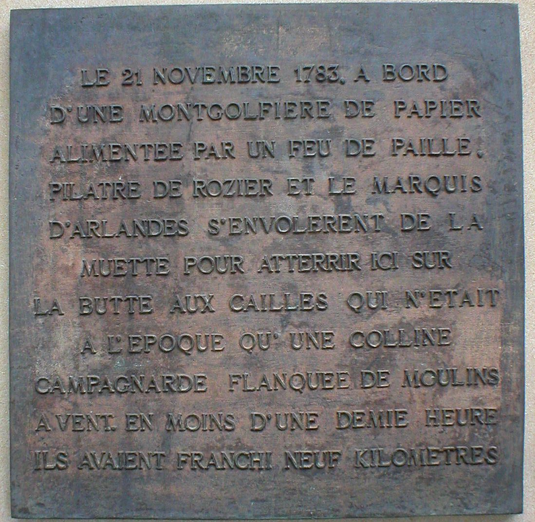 Plaque de bronze apposée sur un pilier au lieu-dit "La butte aux cailles" à Paris (place Verlaine, XIIIe arr.) Prise de vue personnelle Siren 8 jun 2005 à 21:37 (CEST)